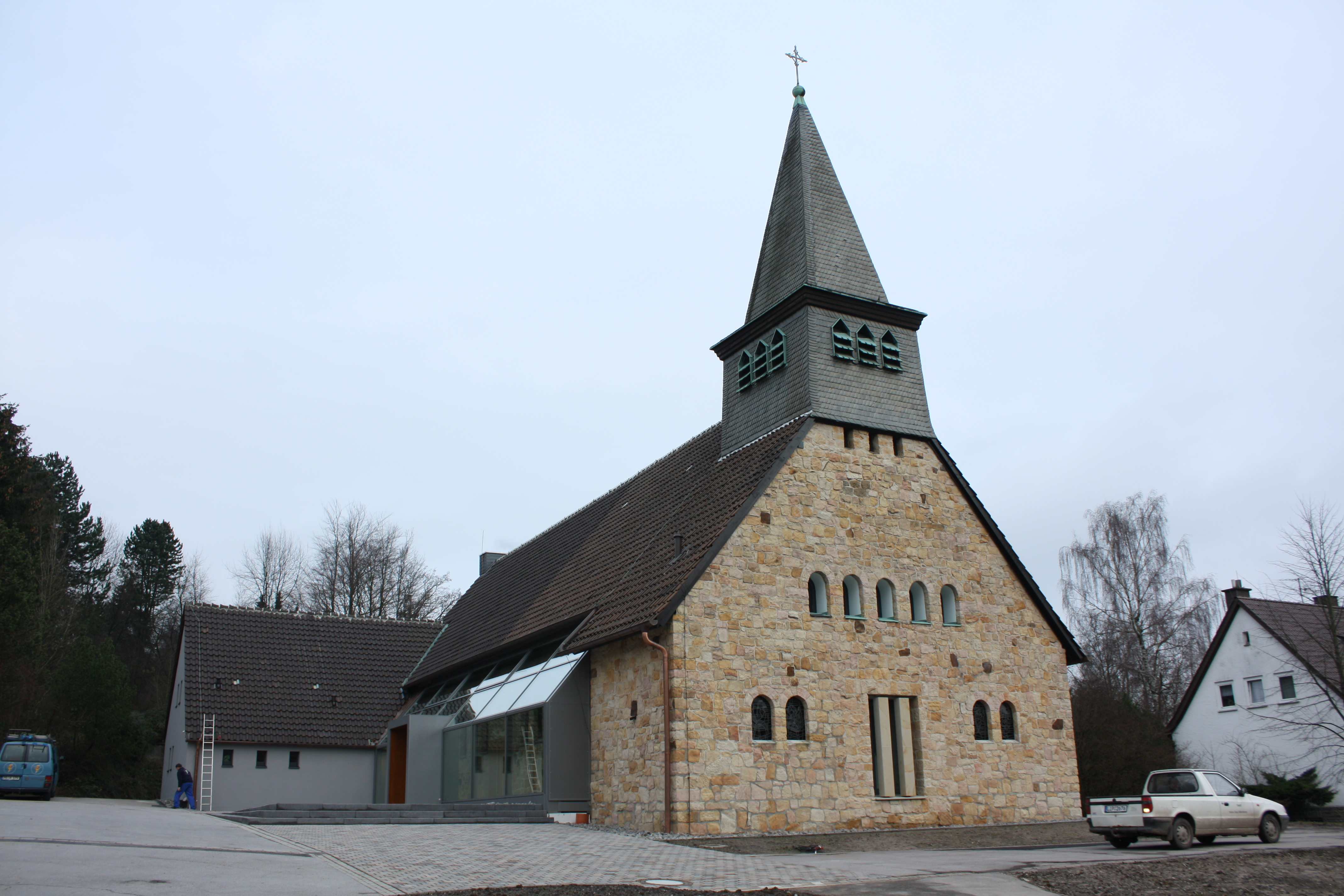 Katholische Kirche in Horn-Bad Meinberg, Ortsteil Horn